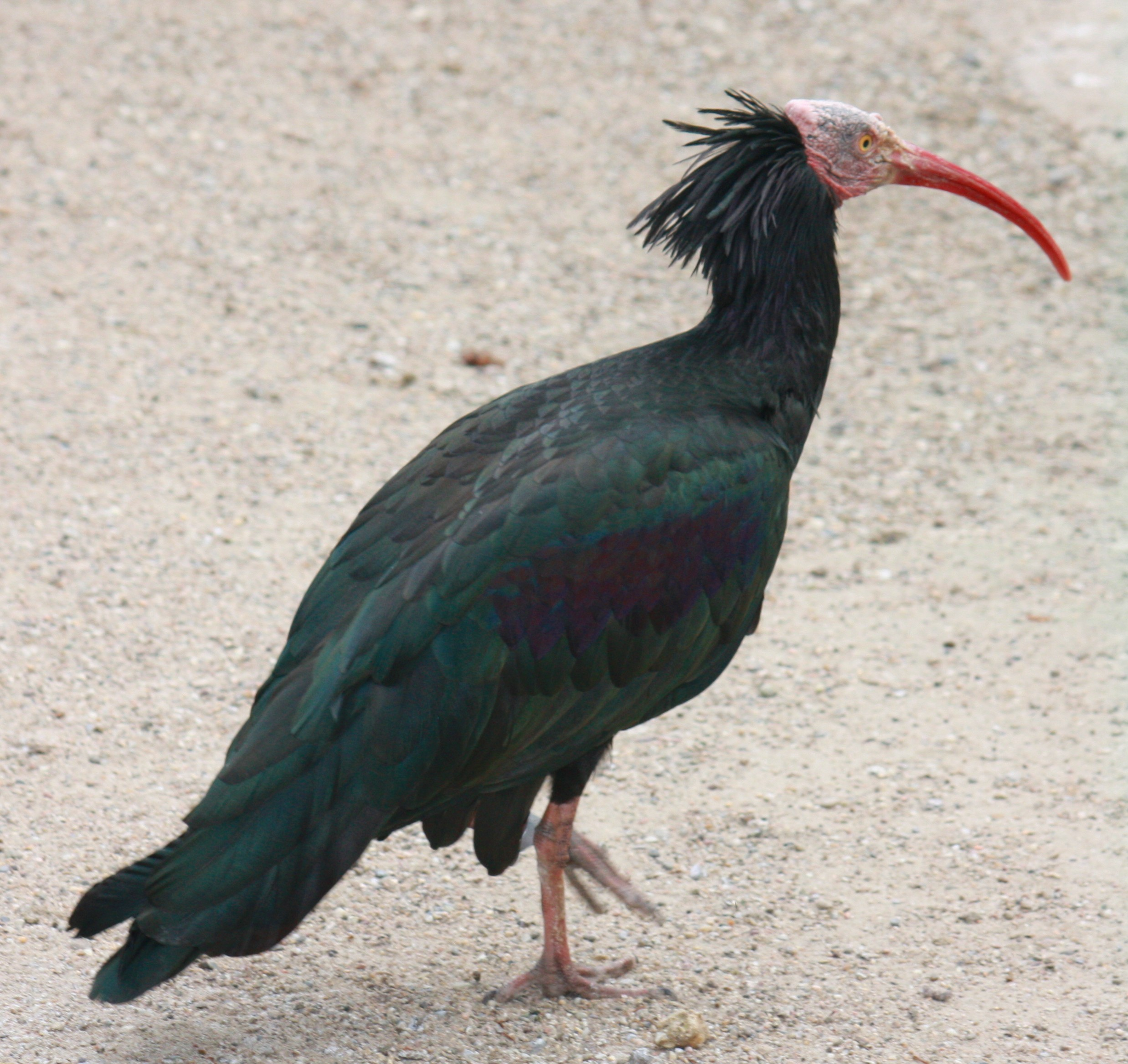 Waldrapp in der Orangerie in Straßburg